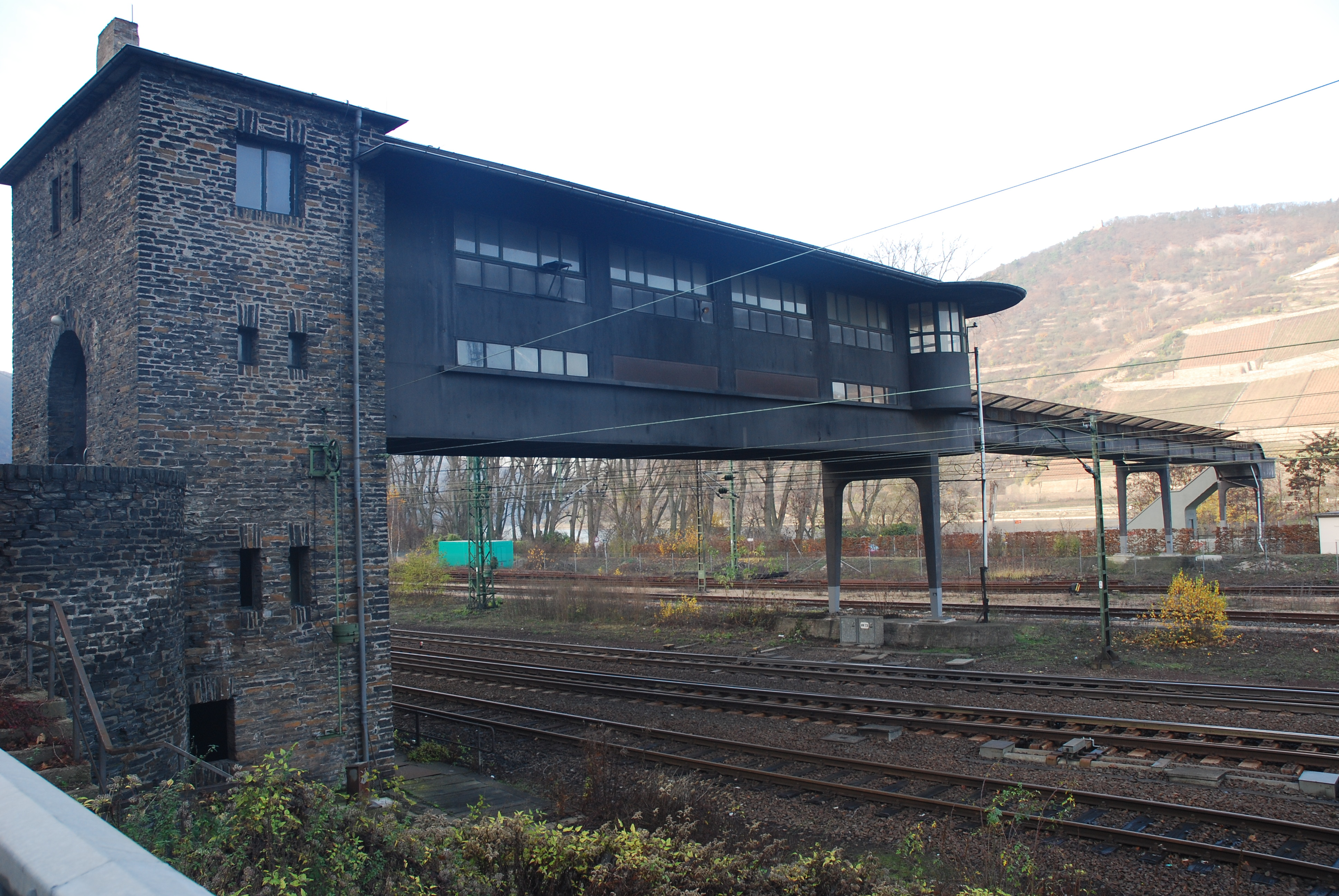 Brückenstellwerk nahe dem Hauptbahnhof in Bingen, erbaut 1936, seit 2005 unter Denkmalschutz